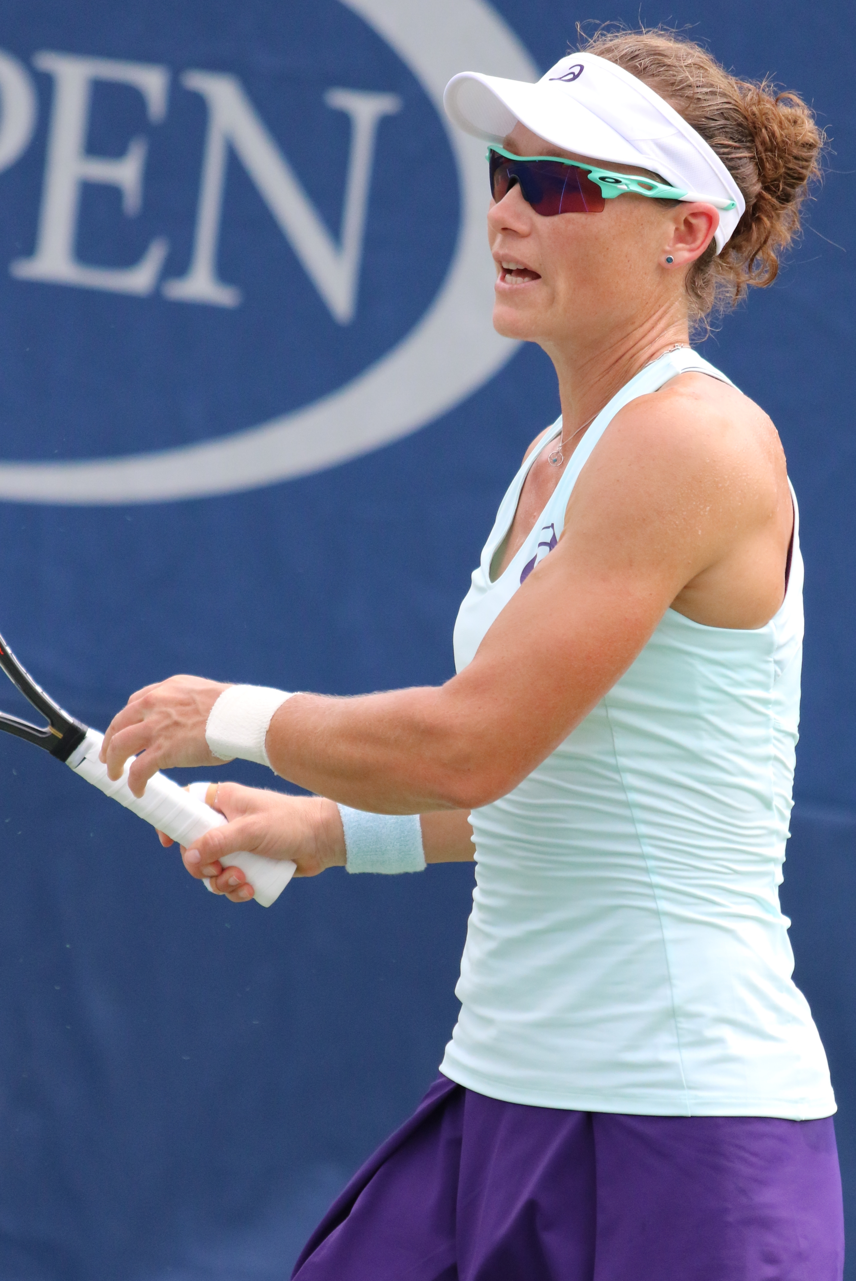 Stosur US16 (26)